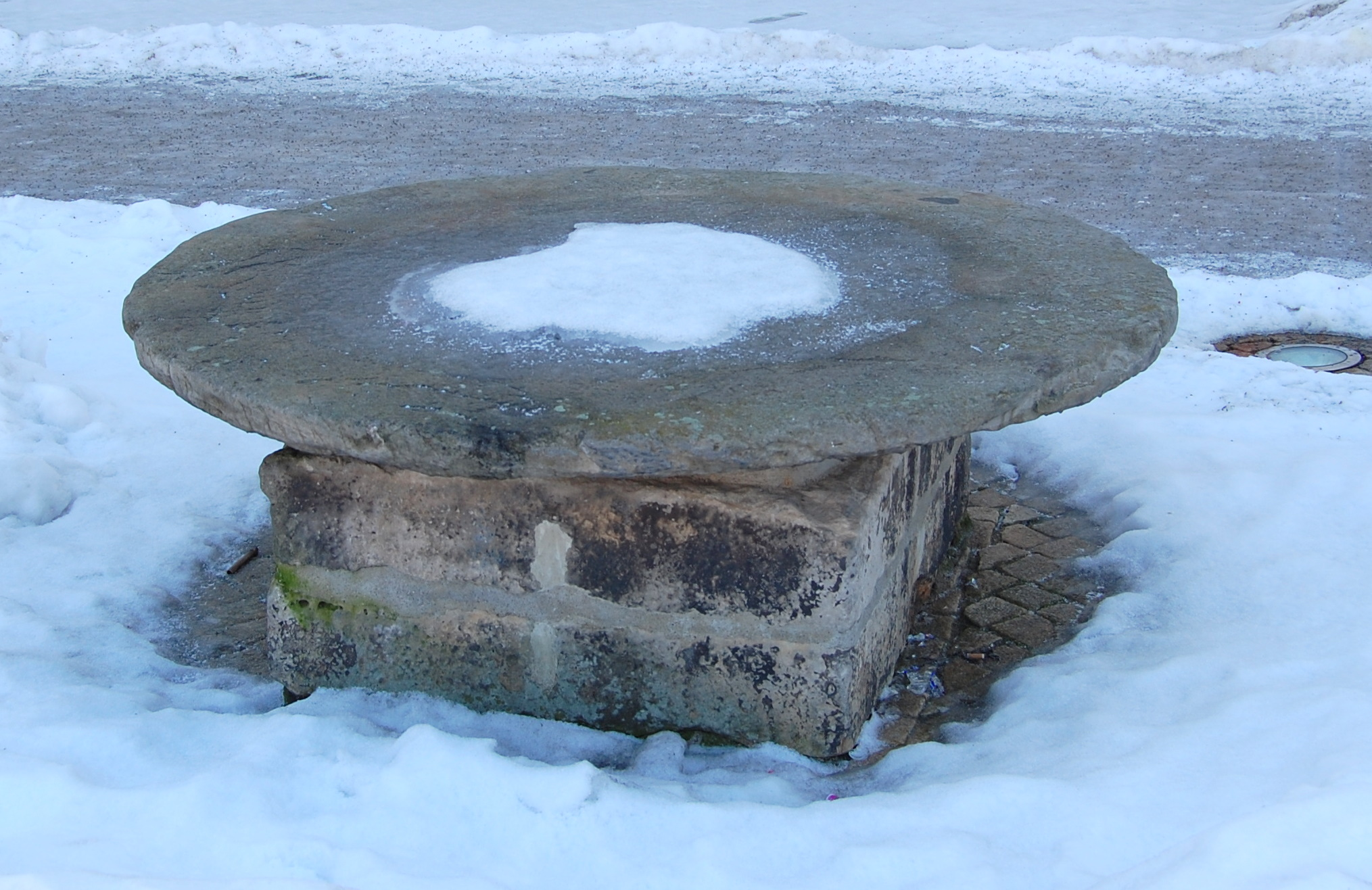 Breiter Stein auf dem Markt in Haldensleben, schneebedeckt